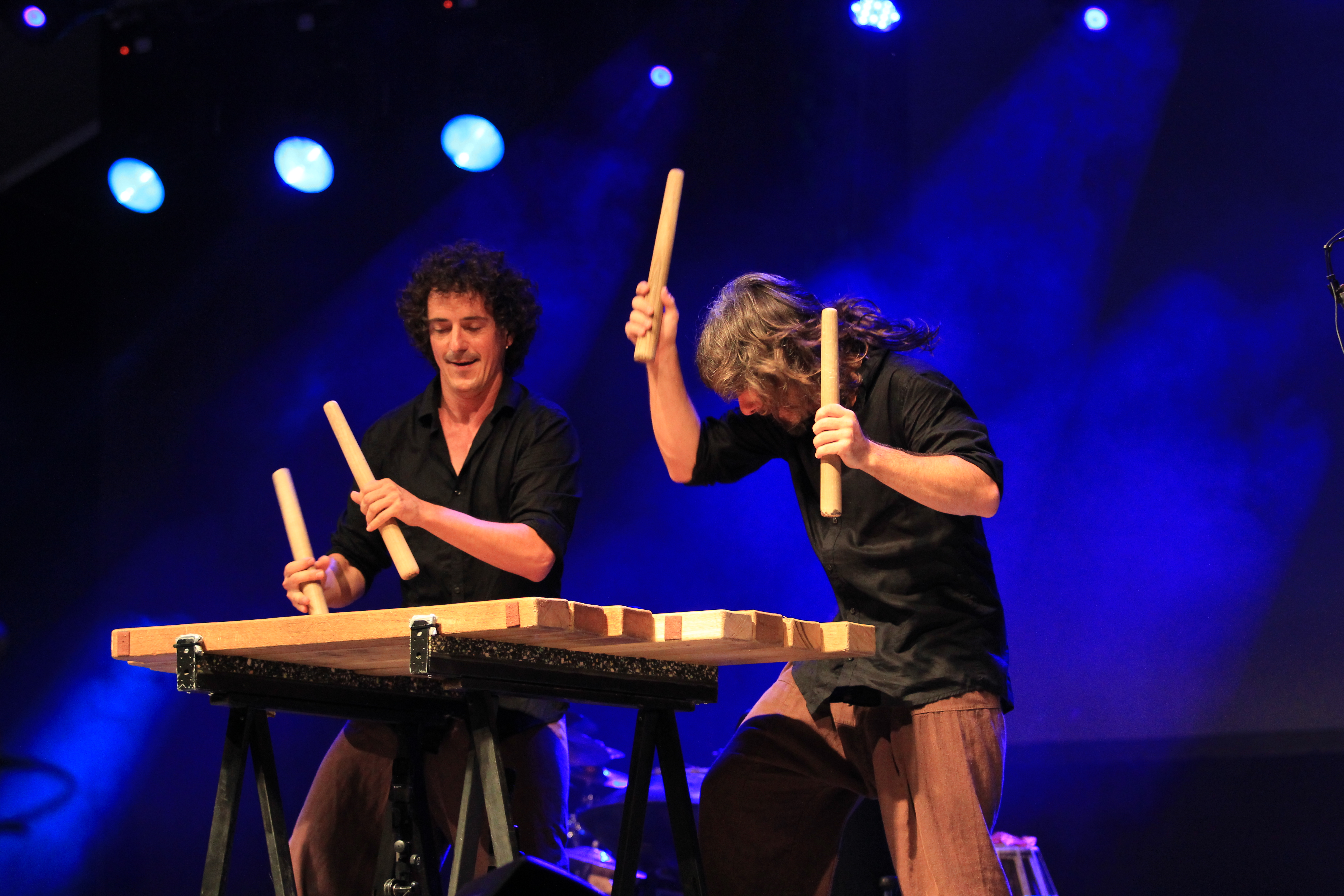 Oreka TX zuzenean